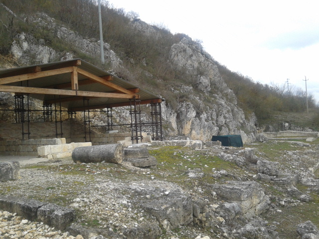 Sito archeologico di Lucus Angitiae